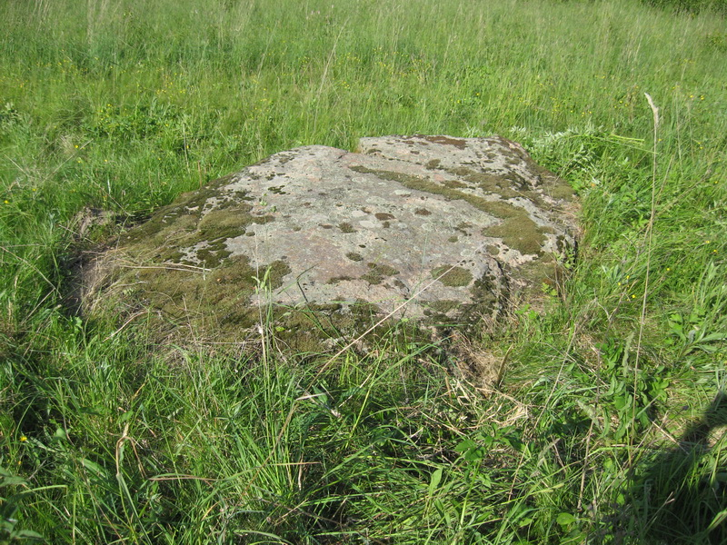 Сідляроўшчына. Барадоўшчынскі валун